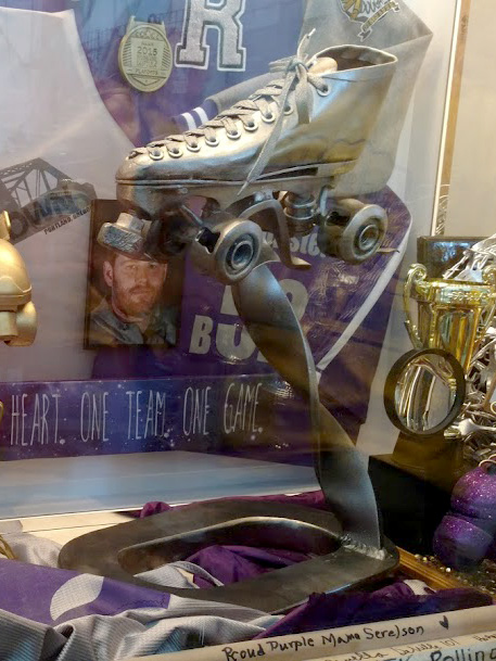 The Hydra, el máximo trofeo del campeonato de Roller Derby WFTDA. Foto del armario de trofeos del campeón Rose City Rollers, en Oaks Park Hangar (12 de agosto de 2016)